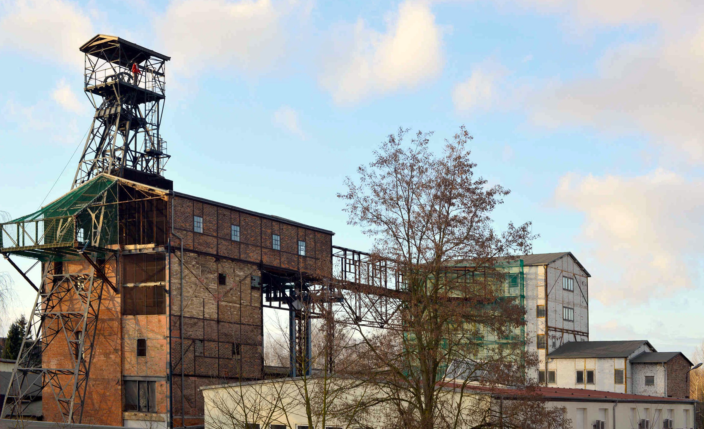 Schacht Doelitz, Blickrichtung Nordwest, ehem. Foerdergeruest mit Haengebank und Schachthaus, rechts Stahlgerippe der ehem. Verbindungsbruecke zum Kohlebunker (Neue Sortierung)